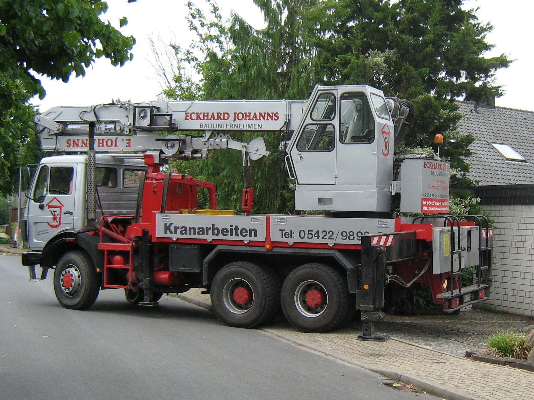 LKW-Kran auf Basis eines Mercedes-Benz NG